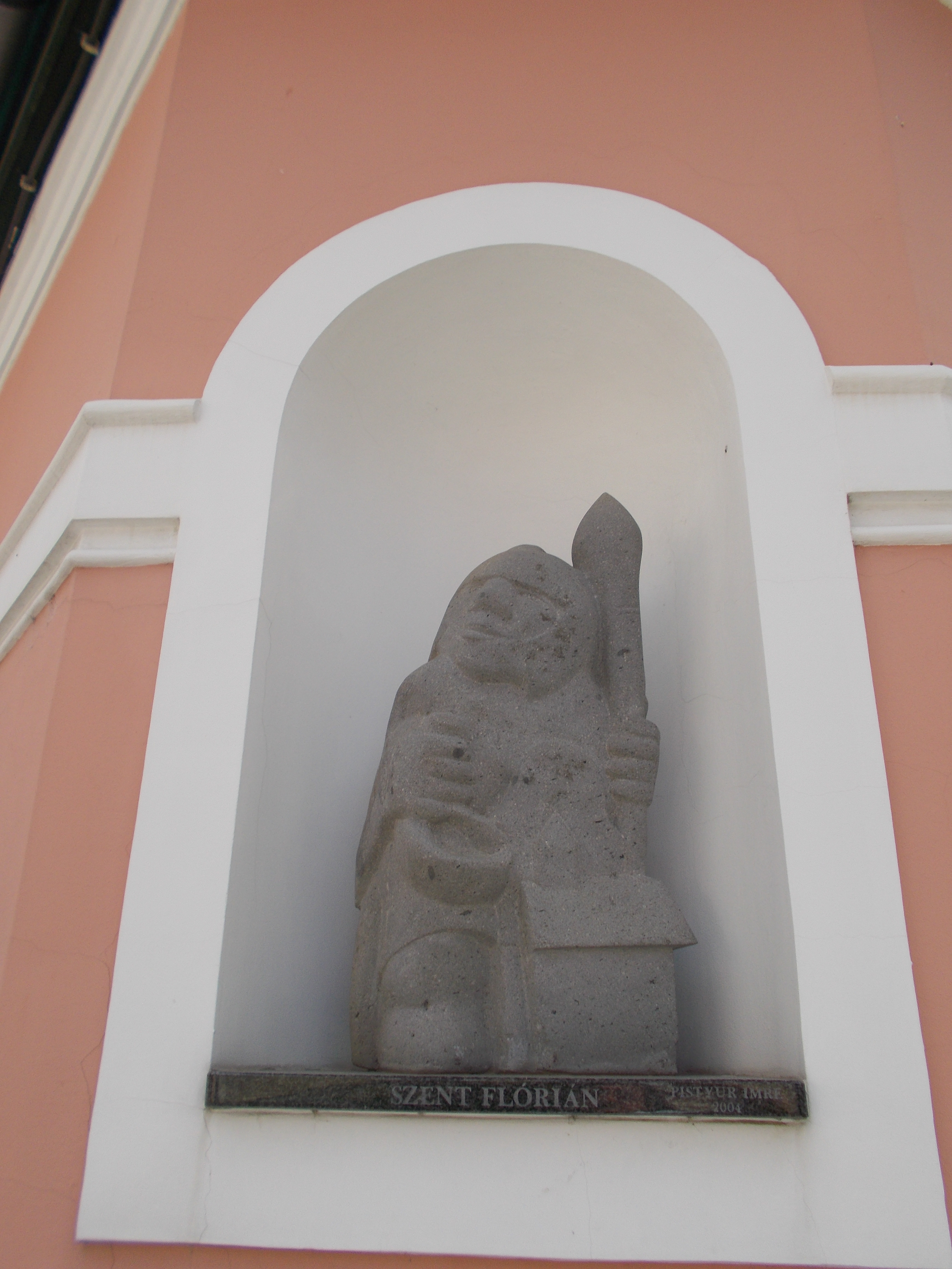 Szt Flórián szobor egy sarokház fülkéjében. Patakkőből 2004-ben készült a kicsiny szobor és Pistyur Imre a mű alkotója. - Pest megye, Szentendre, Rákóczi Ferenc utca és Városház tér sarok